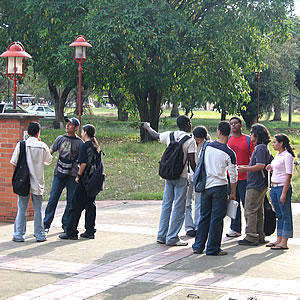 Facultad de Artes Integradas de La Universidad del Valle. Cali, Colombia.